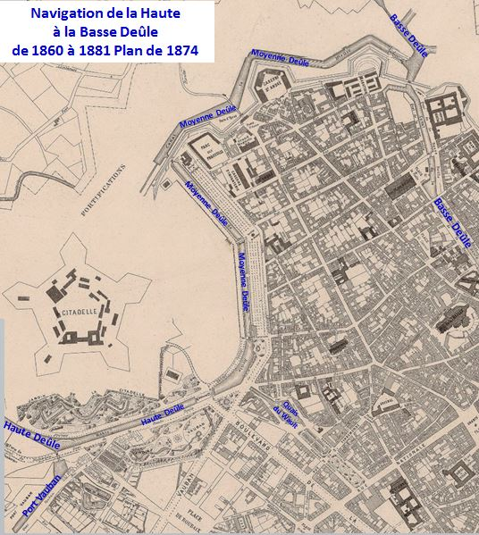 Travail personneld'après Plan de la ville de Lille agrandie de la banlieue et des communes limitrophes / Photogravé sous l'Administration de Mr. Catel-Beghin, Maire de Lille ; Dressé par Mr. A. Mongy, ... ; sous la direction de Mr. Masquelez, ... ; directeur des Travaux Municipaux Gallica BNF Bibliothèque numérique